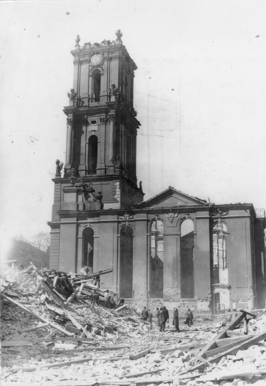 Die Ruhestätte Friedrich des Großen: von englischen Luftpiraten zerstört. Bei einem Terrorangriff der englischen Luftgangster auf die Reichshauptstadt in der Nacht vom 14. zum 15. April 1945 wurde auch die historische Garnison-Kirche in Potsdam, die letzte Ruhestätte Friedrich des Großen, restlos zerstört. UBz: Die Aussenansicht der vollständig ausgebrannten Garnison-Kirche. Fot. Hoffmann 17.4.45 [Herausgabedatum] Zentralbild 17.4.1945 Text, siehe oben. Ausnahme Friedrich des Großen ersetzt durch Friedrich II